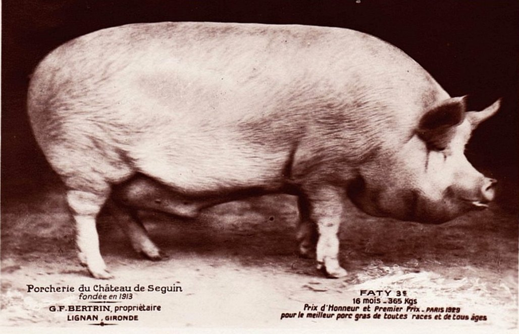 Lignan on post-cards